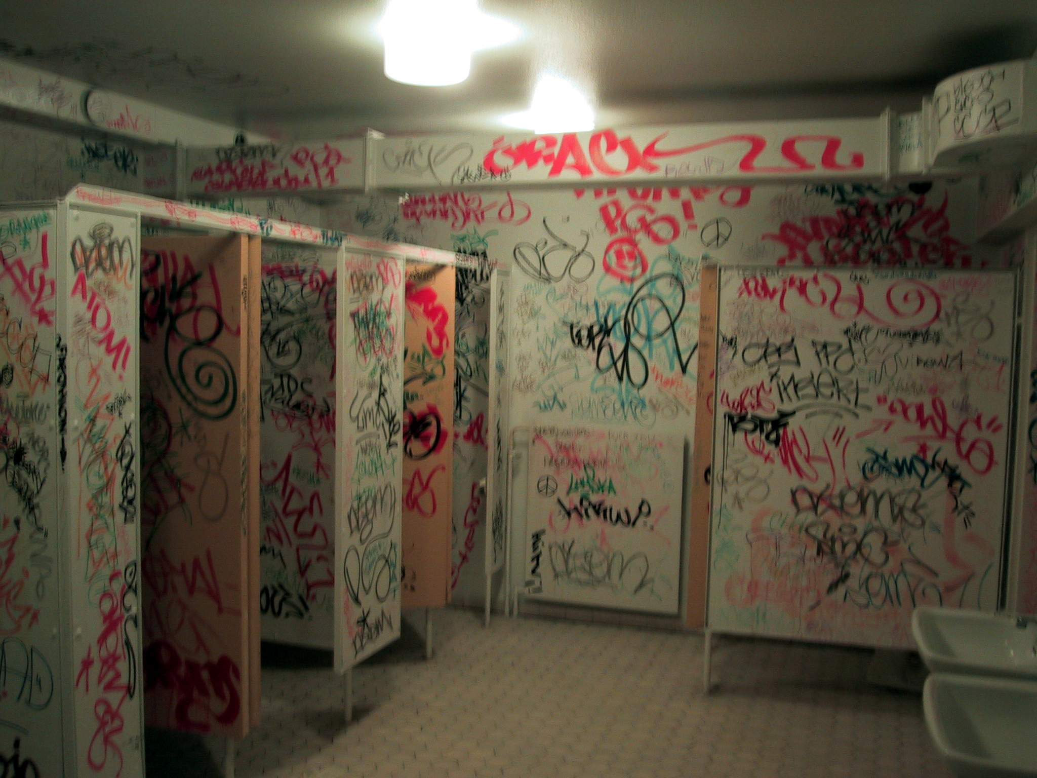 Tags at Meilahti Yläaste Helsinki Finland